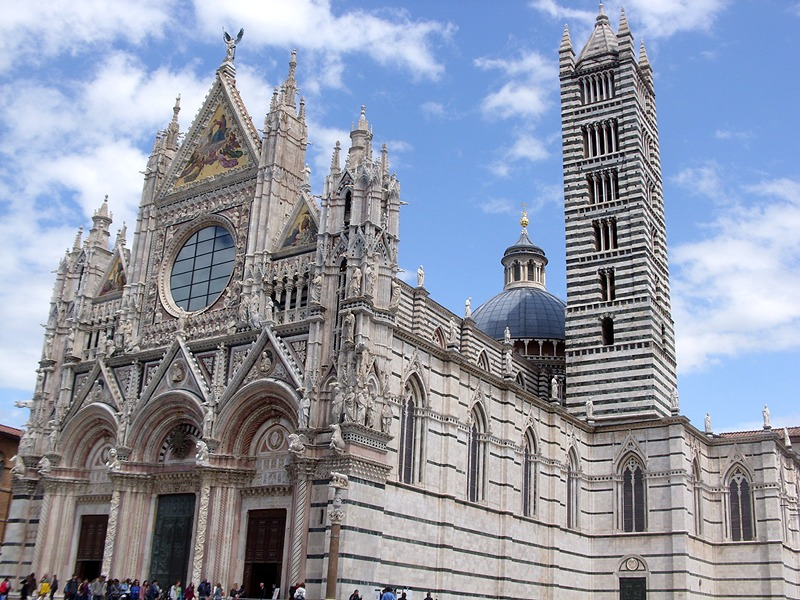 Siena - Duomo